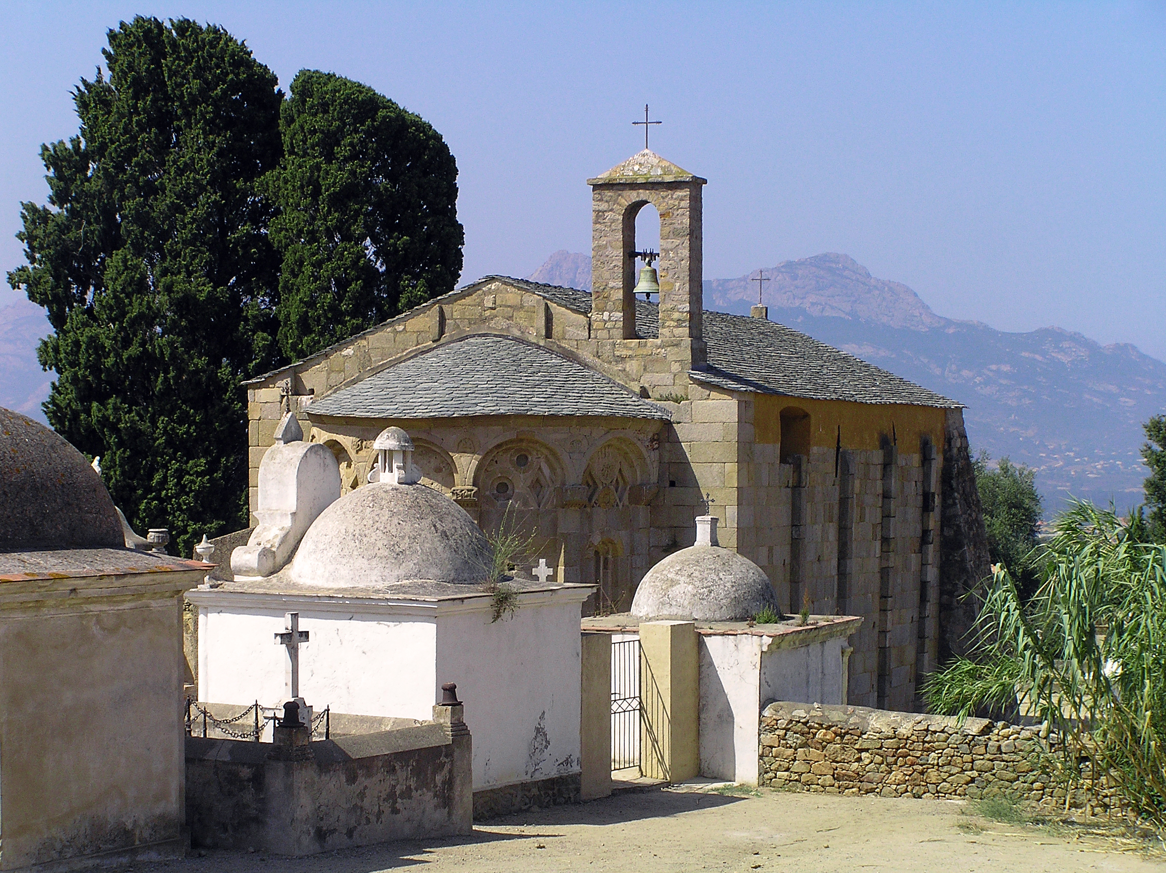 Corsu: Lumiu (Corsica) - A parte orientale di a cappella San Pietro è San Paolo